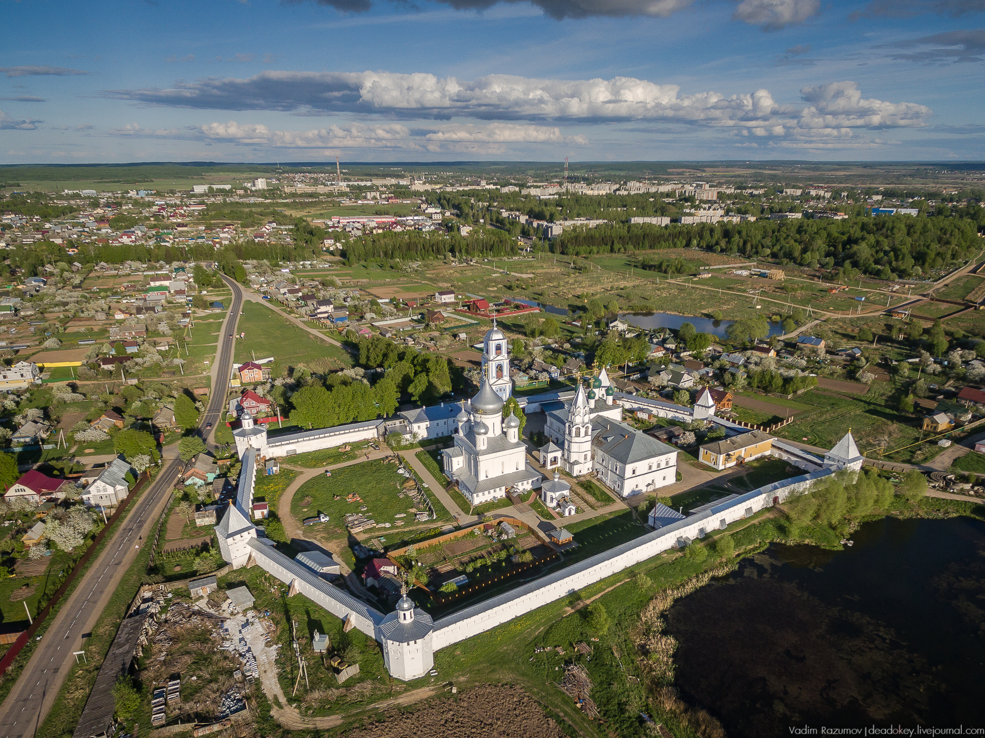 Никитский мужской монастырь в Переславле-Залесском.